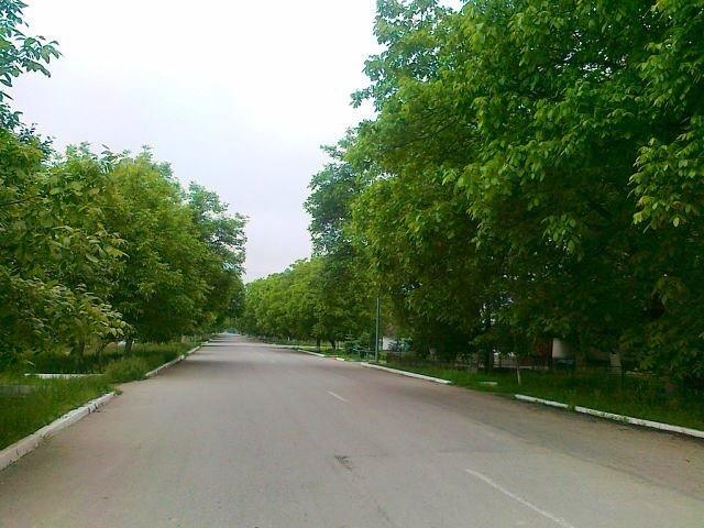 Шитхала. Улица Мира